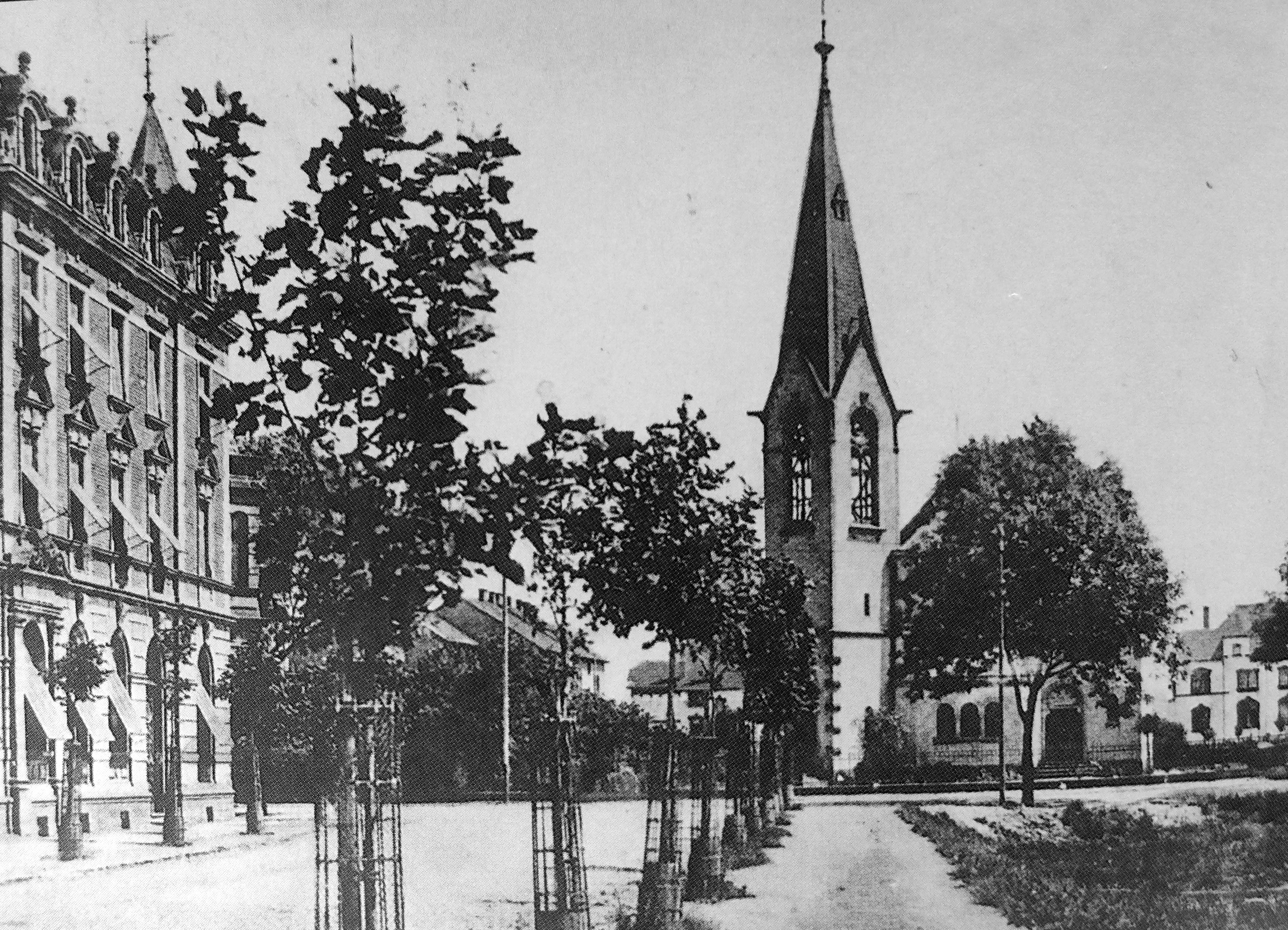 Dillingen/Saar, Evangelische Kirche nach ihrer Fertigstellung im Jahr 1903 (Kreisarchiv Saarlouis)